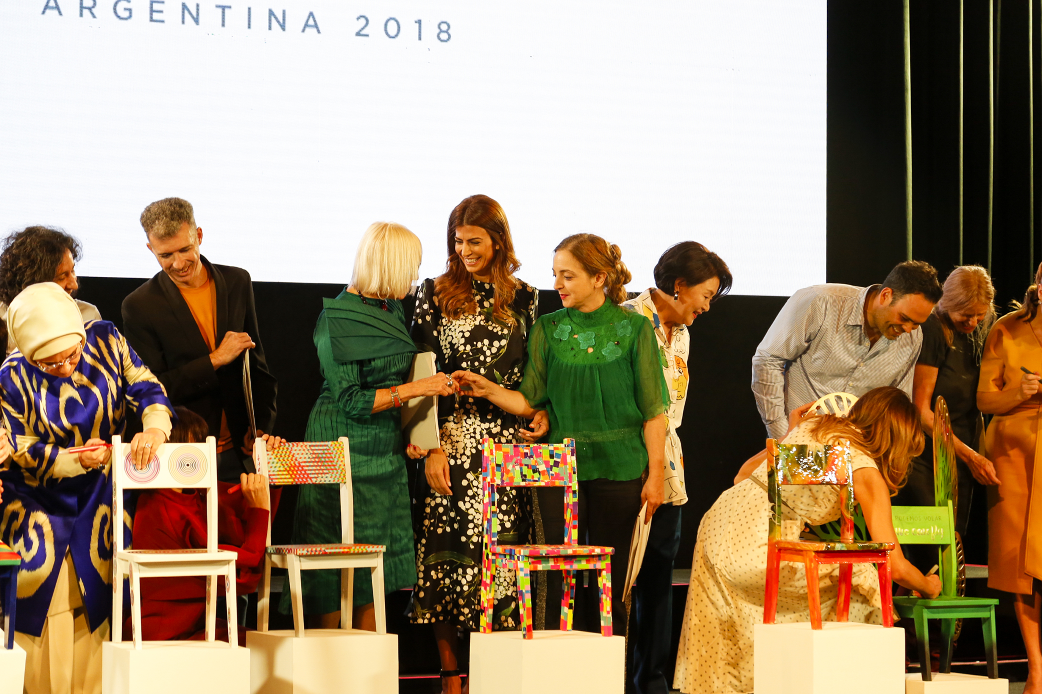 Partners Programme - MALBA - Day 2